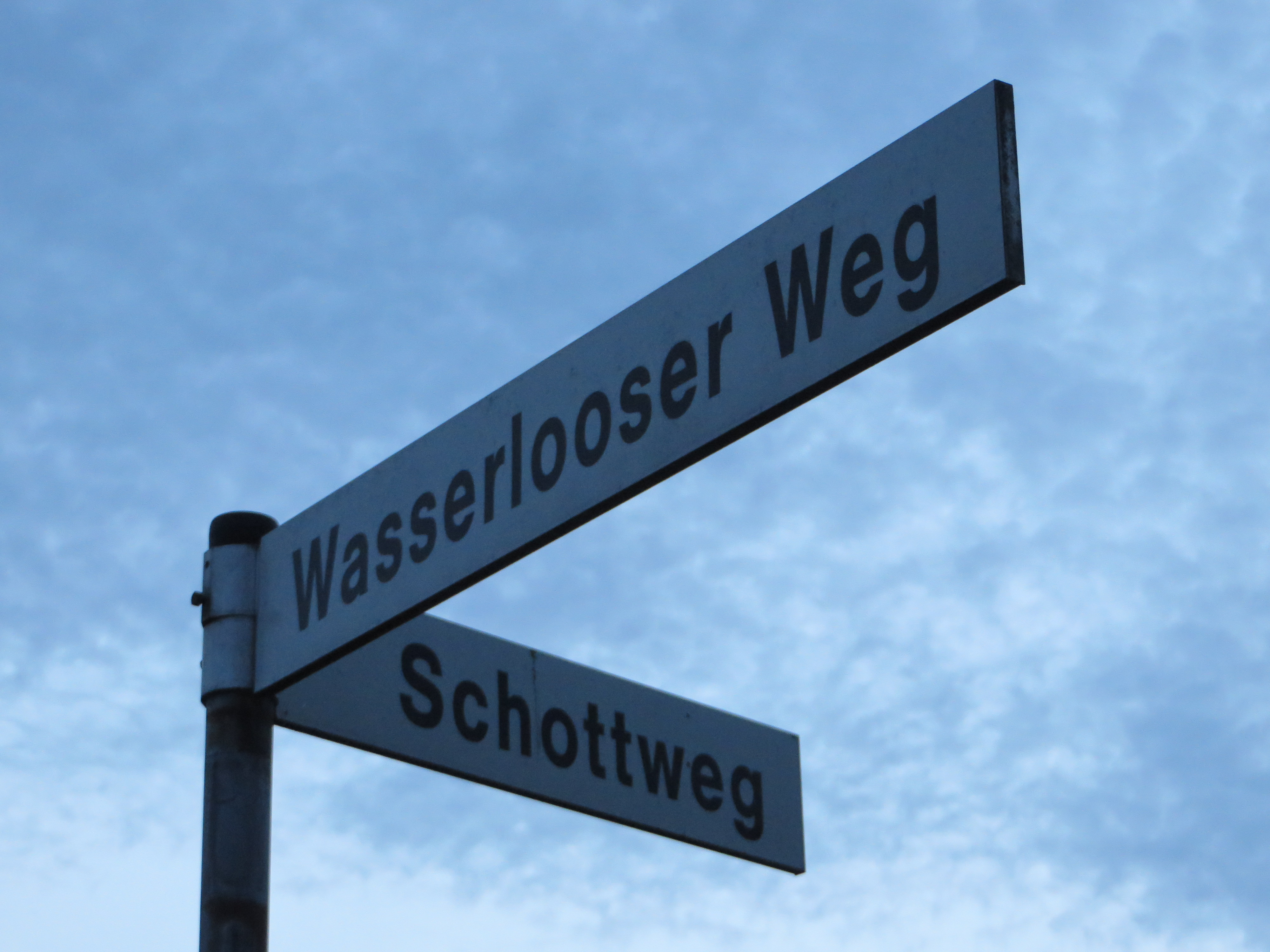 Straßenschilder Wasserlooser Weg und Schottweg (Flensburg 2014)